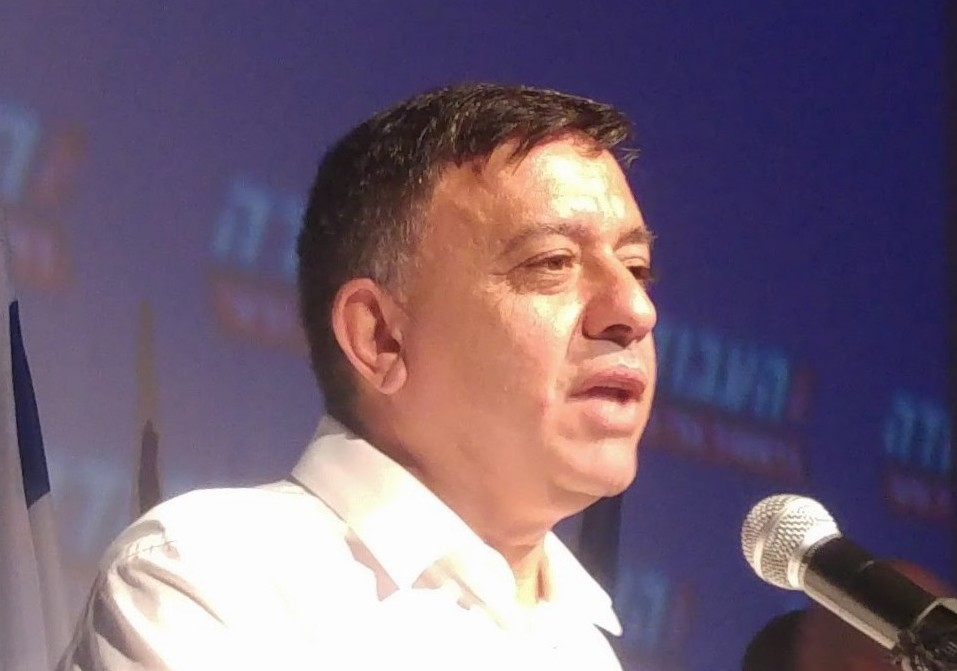 אבי גבאי במסיבת הניצחון בדרום תל אביב יום חמישי 27/07/2017